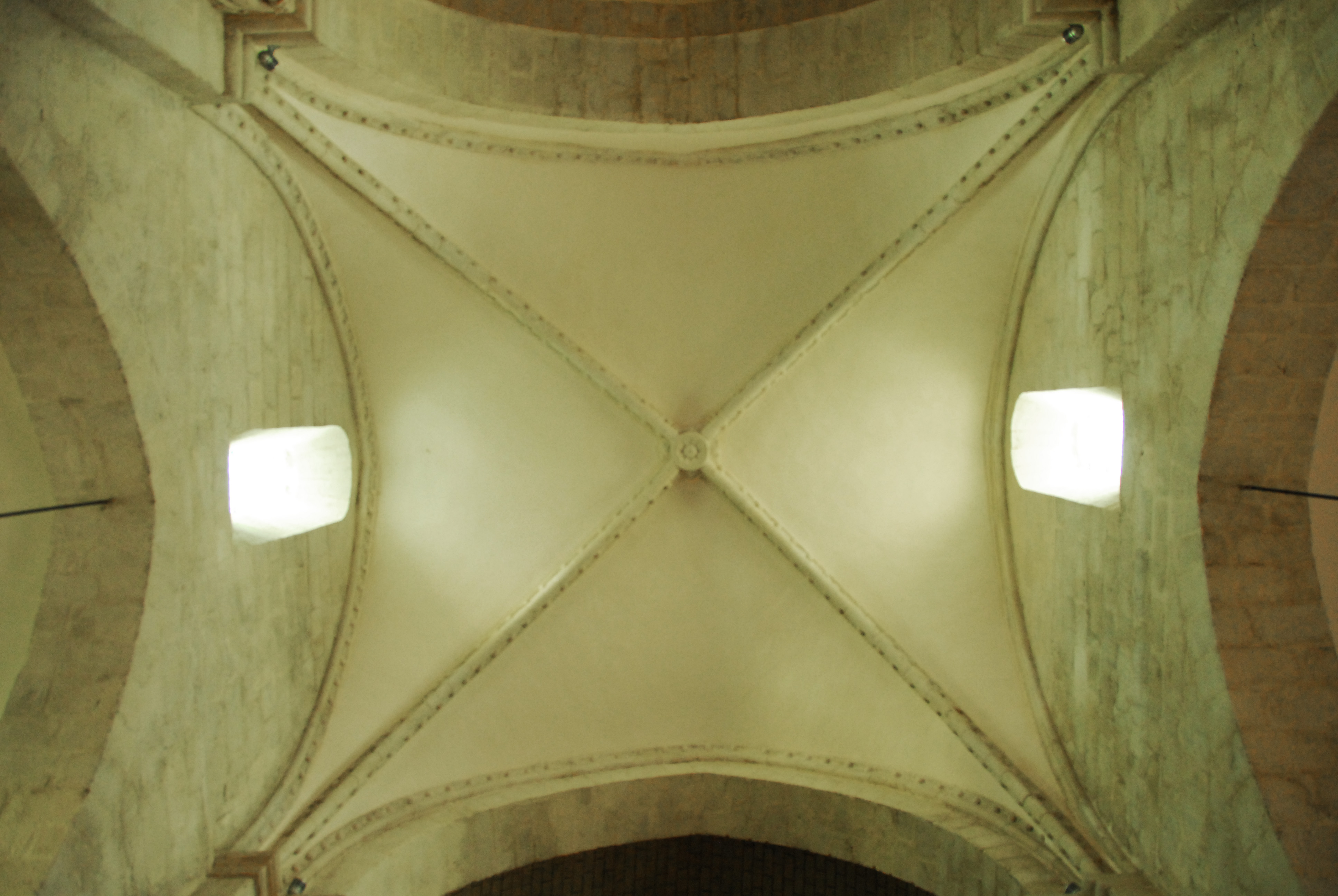 N.-D. de La Souterrain, Kreuzrippengewölbe Mittelschiff, Joch 3